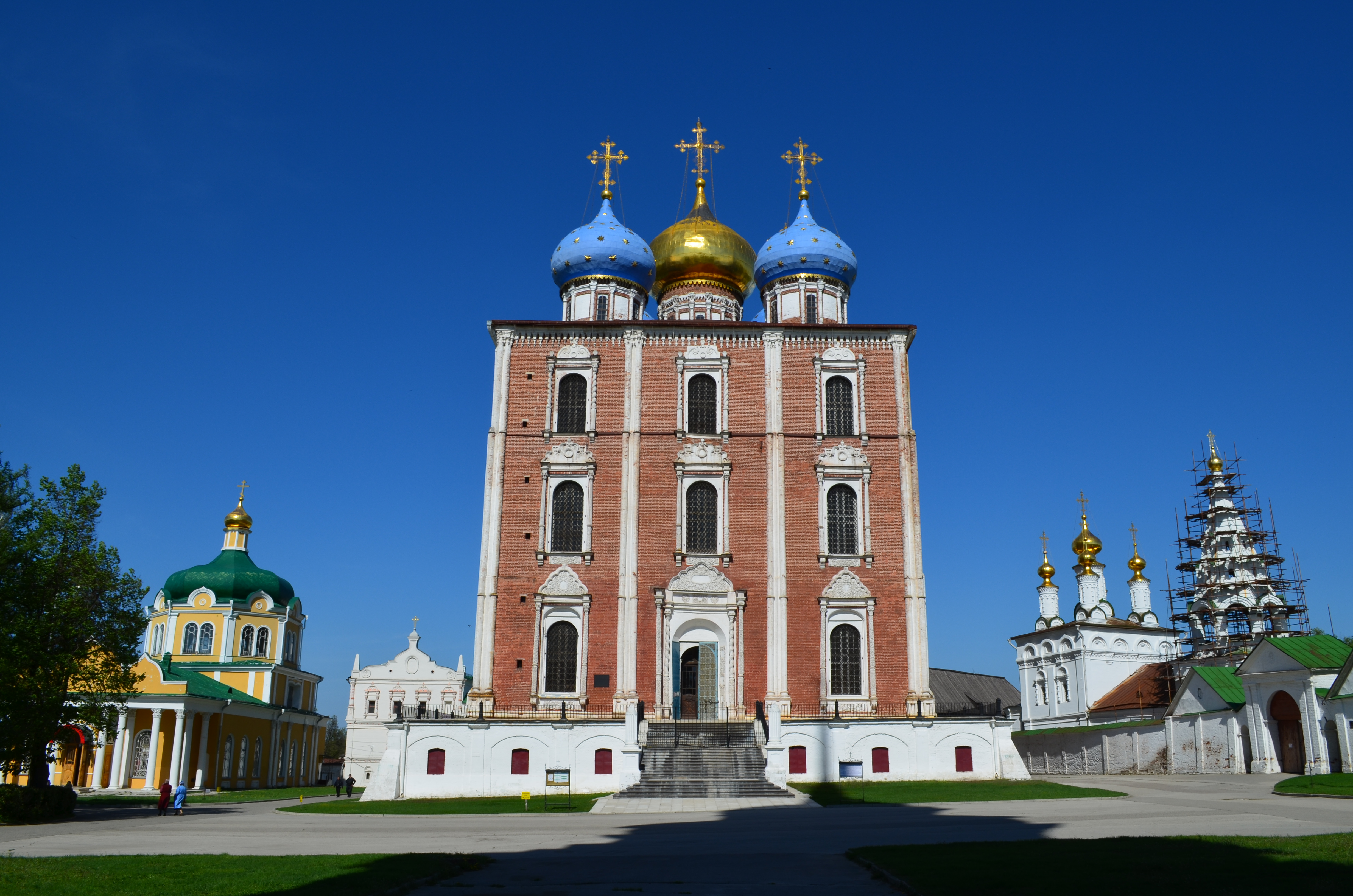 Рязанский кремль.Успенский собор.1693-1699 гг.